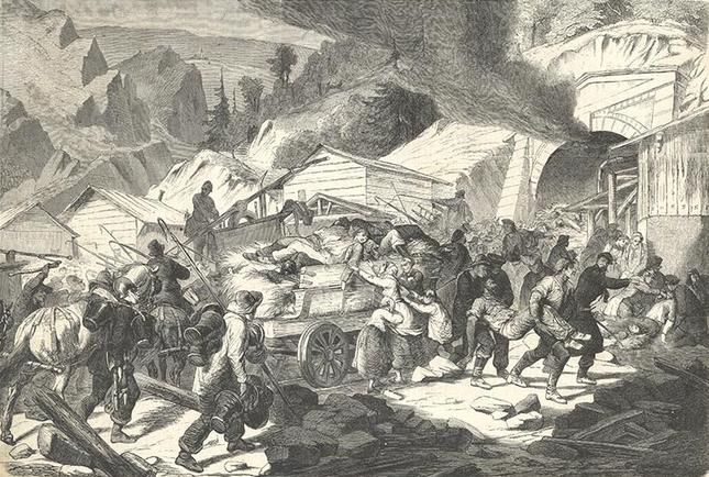 Vor dem Hauensteintunnel, Holzstich